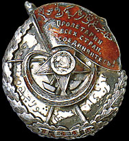 Орден Красное Знамя Азербайджанской ССР. Учрежден в 1920 г.